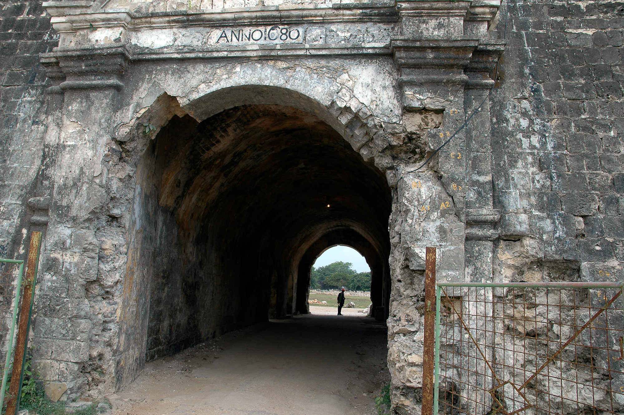 யாழ்ப்பாணக் கோட்டை - பிரதான நூளைவாயில்